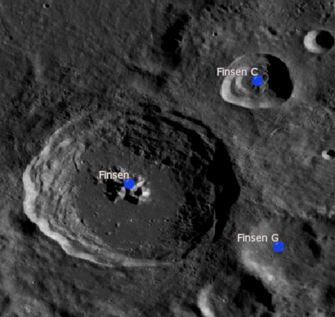 Cráter lunar Finsen. Cráteres satélita. (Imagen LRO)